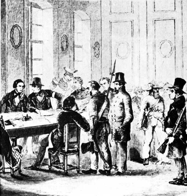 Die provisorische Regierung im Rathaus von Dresden. Vorne sitzend Michail Bakunin, hinten sitzend von links Otto Heubner, Karl Todt und Samuel Tzschirner.